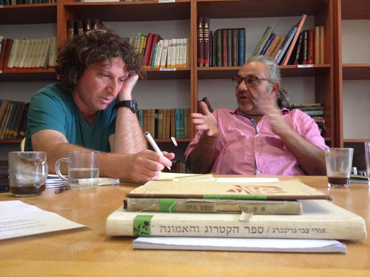 אייל בן דב ואליעז כהן בשיחת הכנה לקראת פרויקט 'פוטופואטיקה' #6 בבית אורי צבי